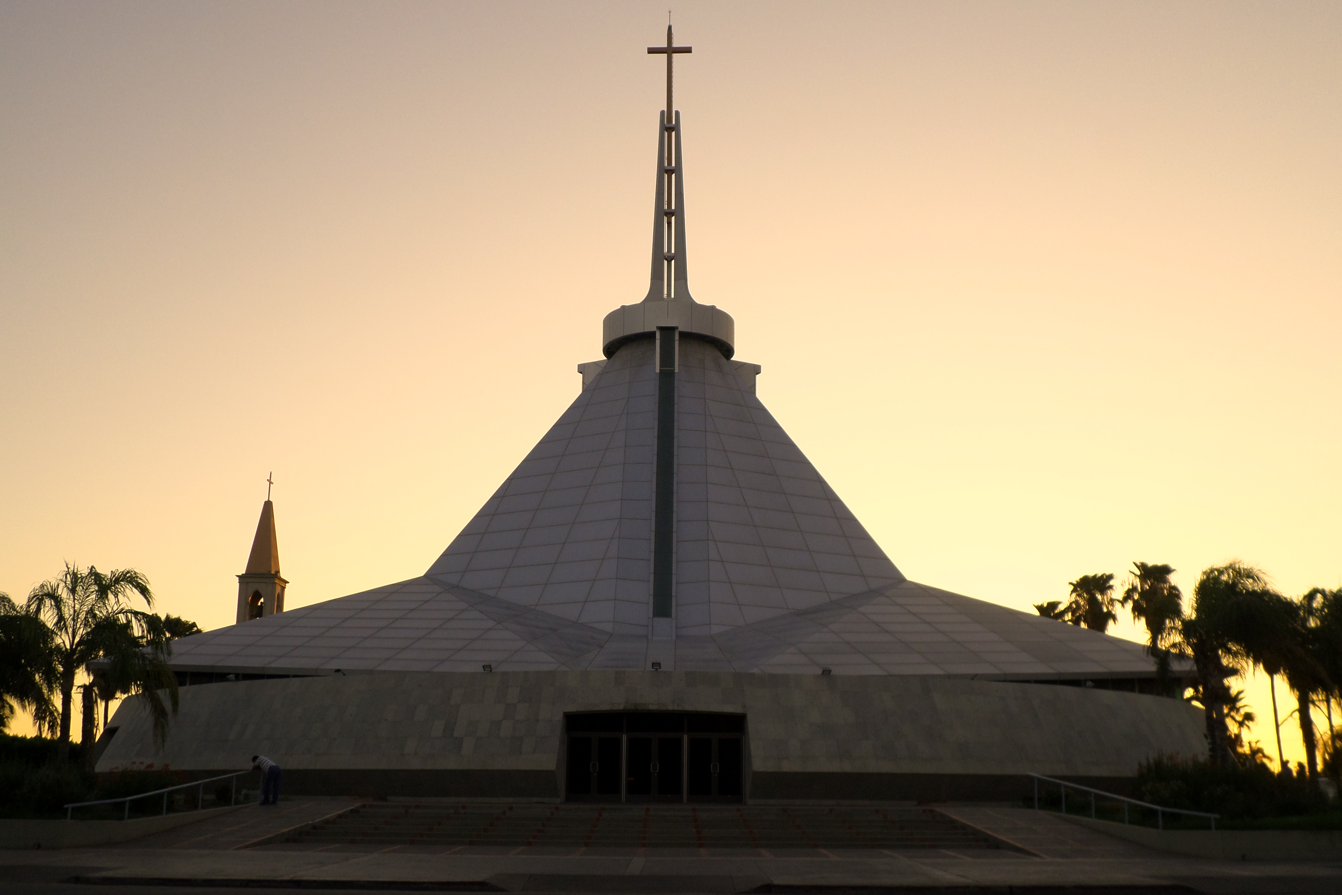 Catedral de Ciudad Obregón.